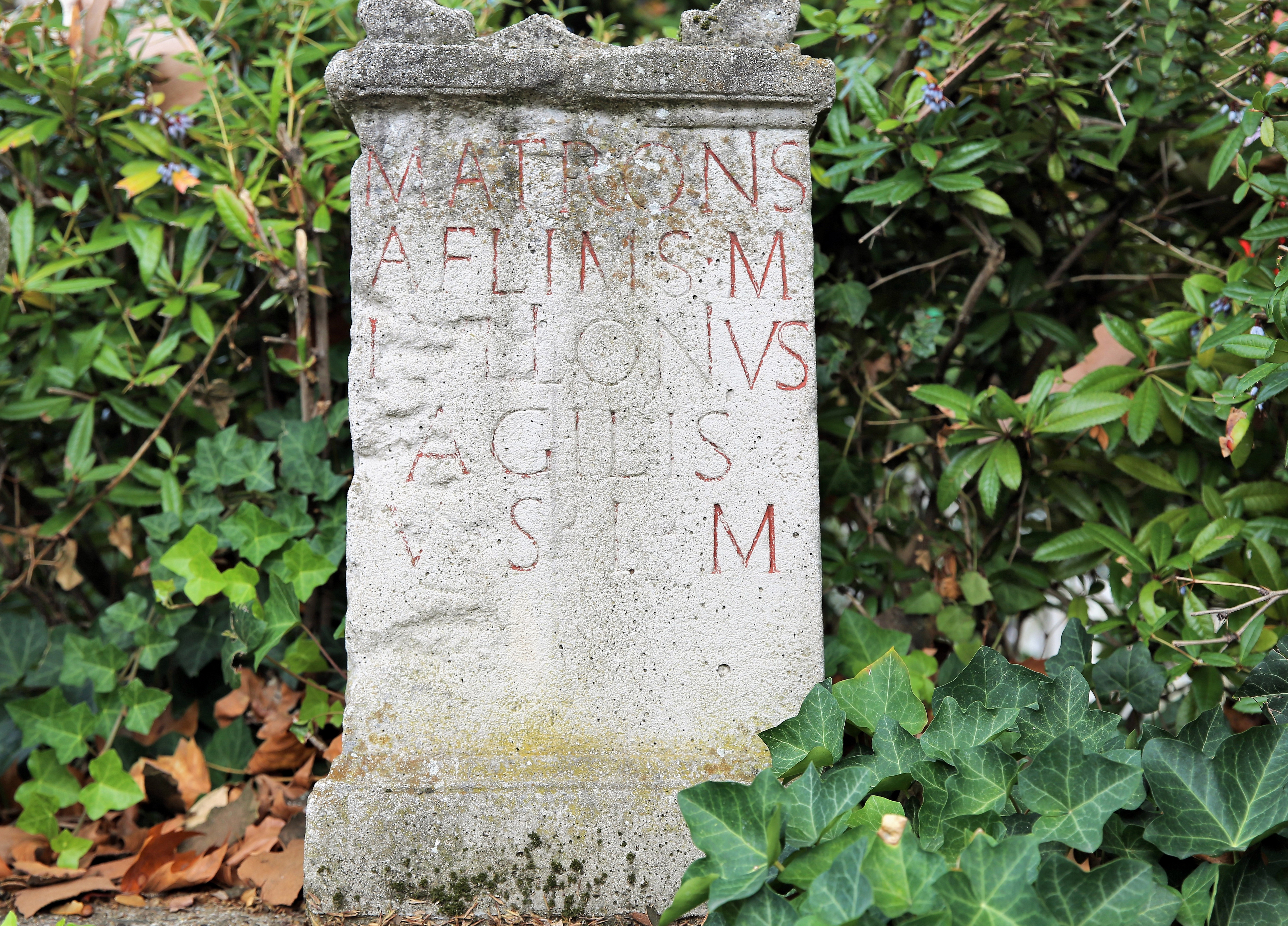 Votivstein (Nachbildung) der Matronae Afliae in Wesseling (2.-3. Jh.) FO. Nieder-Wesseling, 1882 an der alten Kirche. Seit 1984 vor dem neuen Rathaus in Wesseling aufgebaut. Die Inschrift des Steins lautet: „Matronis / Aflims M(arcus) / Iullionius / Agilis / v(otum) s(olvit) l(ibens) m(erito)“